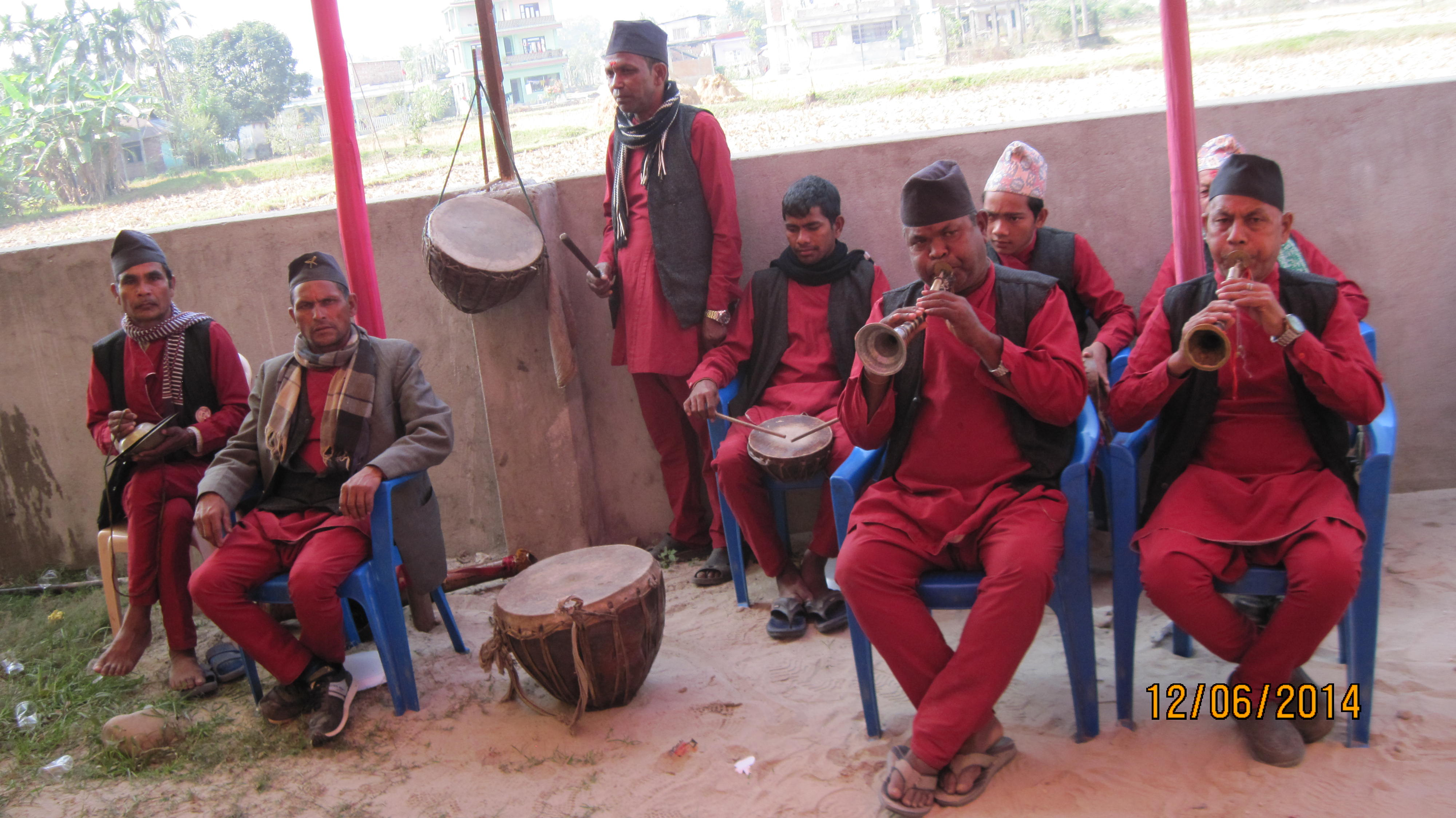 नेपाली: विवाह र अन्य उत्सवमा बजाइने नेपाली बाजा । पन्जैबाजा भनेर चिनिने यस किसिमका बाजाहरूकाे लाेप हुँदै गएकाे देखिन्छ ।